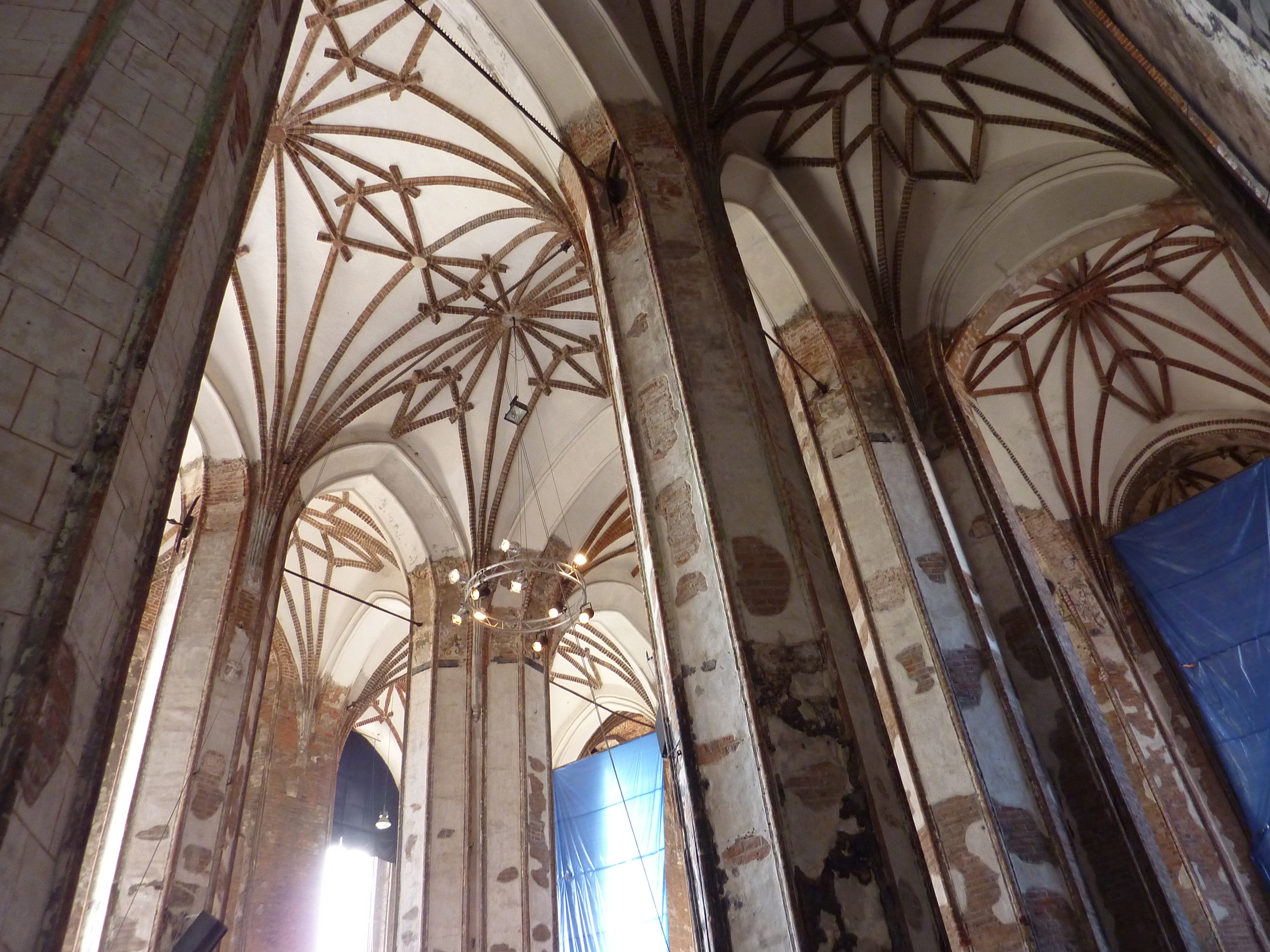 Sklepienie kościoła św. Jana w Gdańsku.